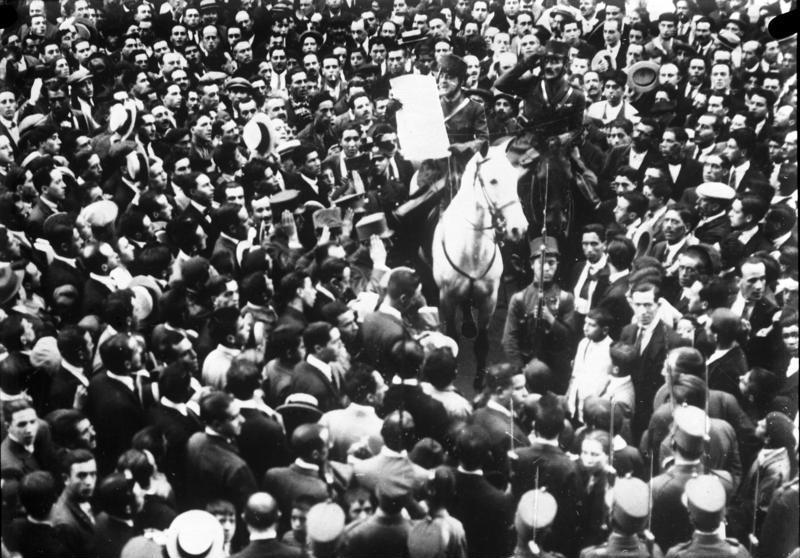 Der spanische Diktator Primo de Revera gestürzt! Das war der Jubel vor 7 Jahren, als der spanische Diktator durch Primo de Reveras Offiziere dem Volk in Madrid verkündet wurde.